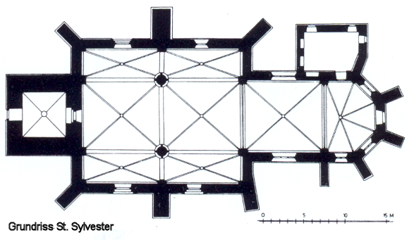 St. Sylvester Quakenbrück, Grundriss